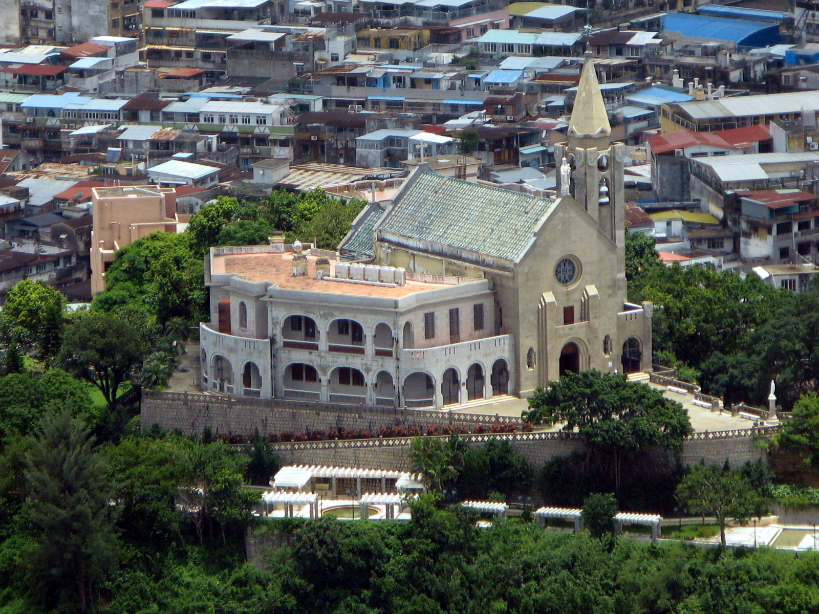 Xi Wang Yang Shan Sheng Tang 西望洋聖堂